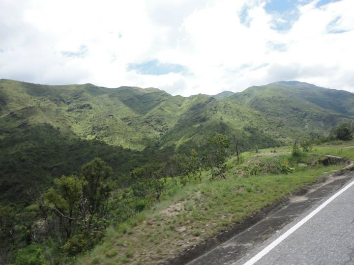 Se enseñan las montañas de choroni.